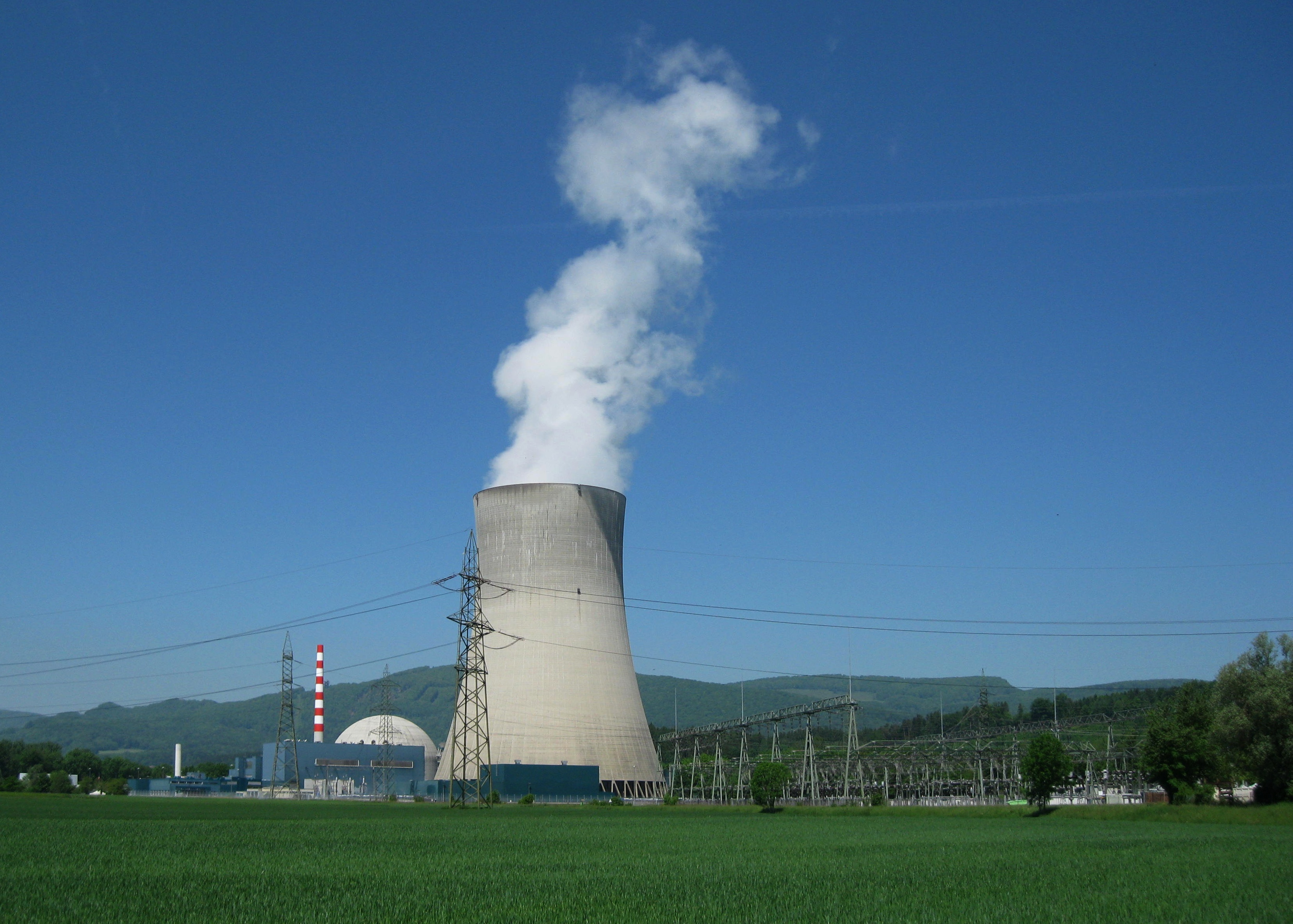 AKW Gösgen